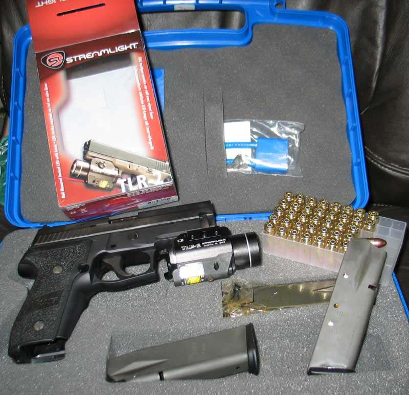 SIG SAUER P229SIG SAUER P229